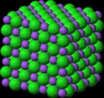 resim